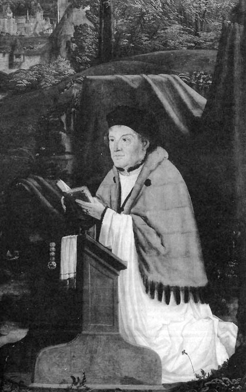 Ägidius Rehm als Domherr von Passau, um 1520, Gemälde in der Erzabtei St. Peter, Salzburg